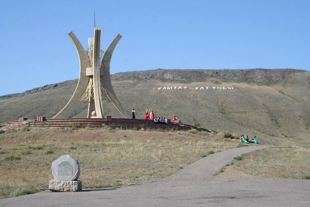 Ұлытау жері